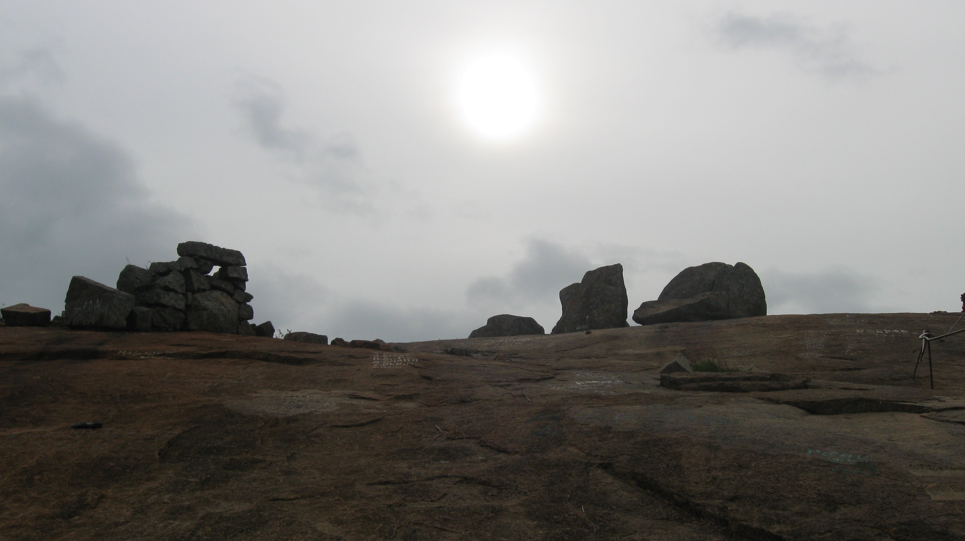 சங்க இலக்கிய வள்ளல் பெருமக்களுள் ஒருவரான வேள்பாரி வாழ்ந்த பறம்புமலையின் உச்சியில் எடுக்கப்பட்ட புகைப்படம்.